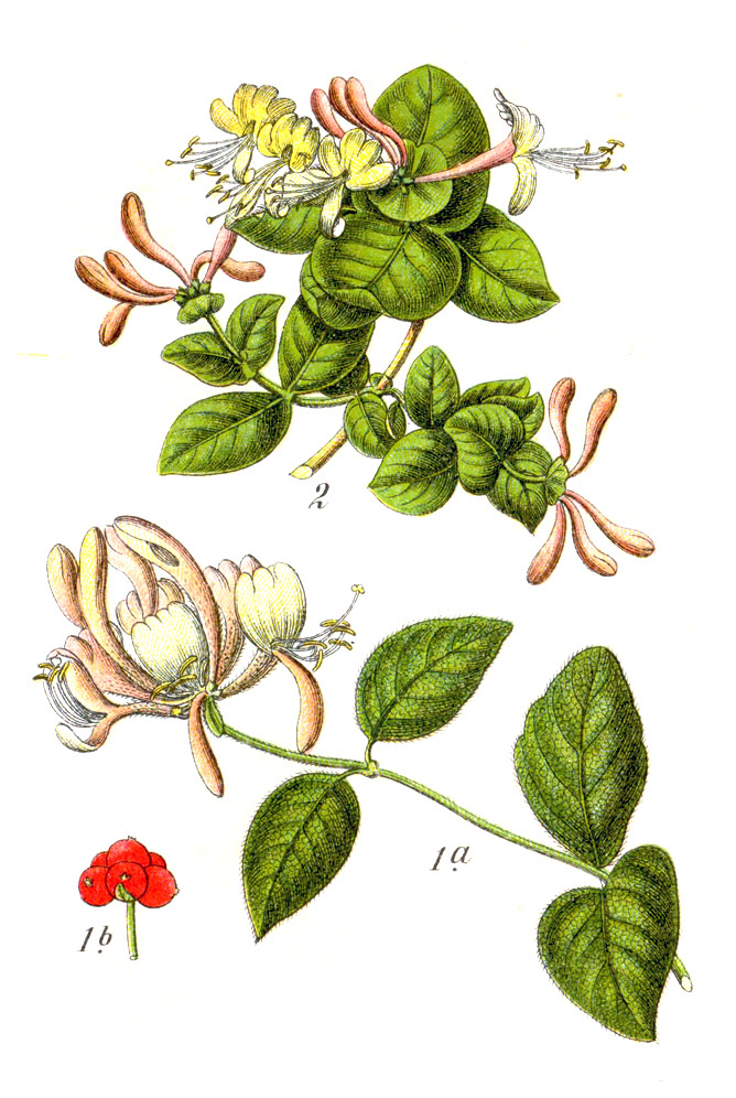 1. Lonicera periclymenum L. 2. Lonicera caprifolium L. Original Caption 1. Wildes Geissblatt, Lonicera periclymenum 2. Echtes Geissblatt, Lonicera caprifolium